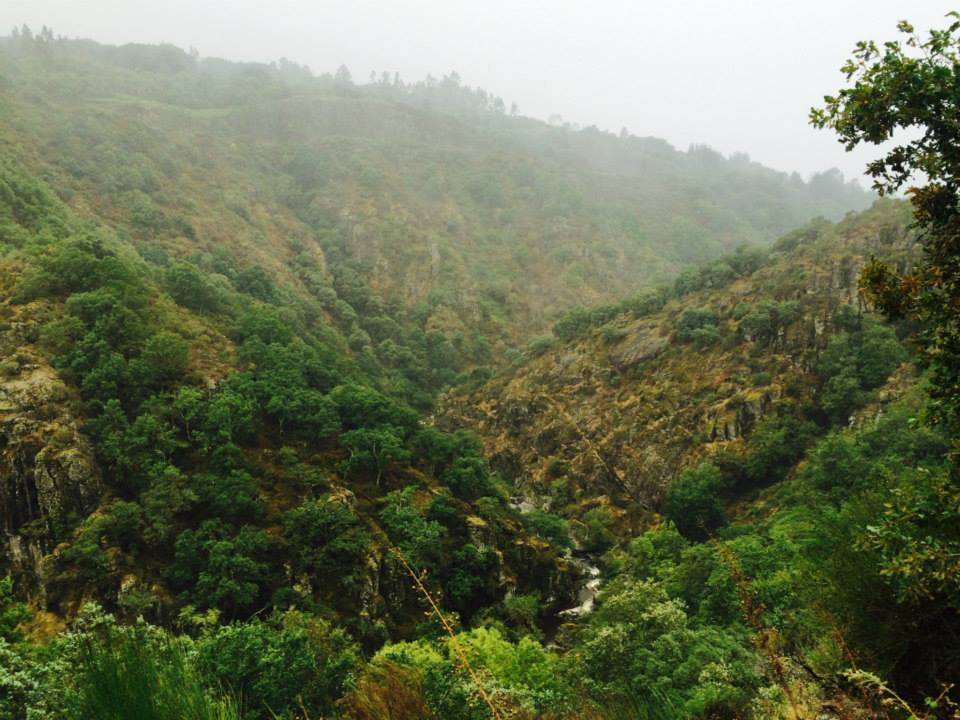 Vista Río Limia